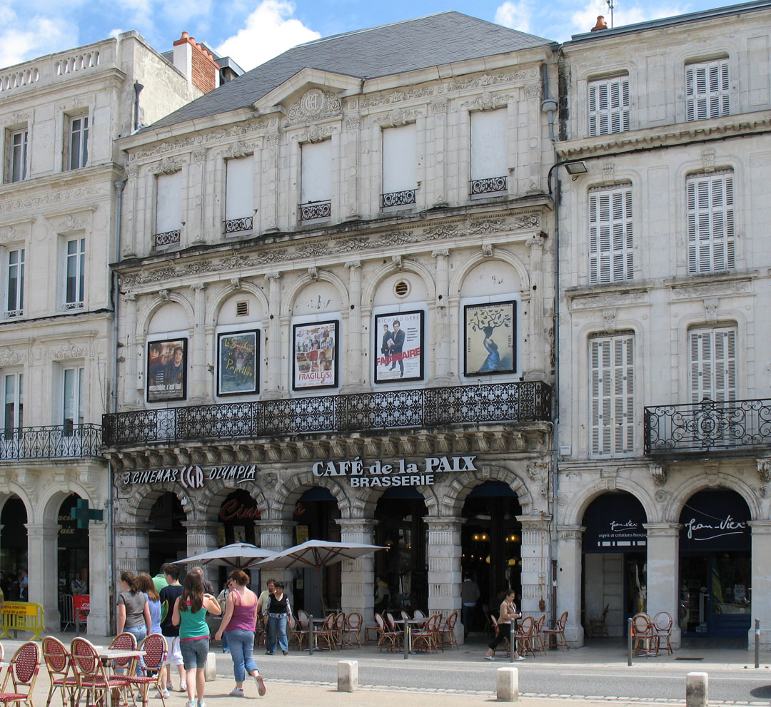 Café de la Paix, La Rochelle, France